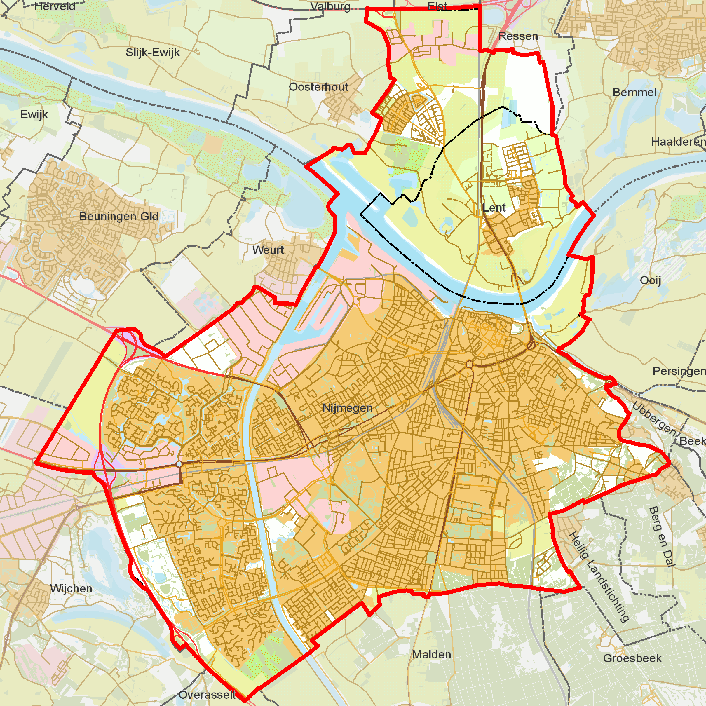 BAG woonplaatsen - Gemeente Nijmegen.png